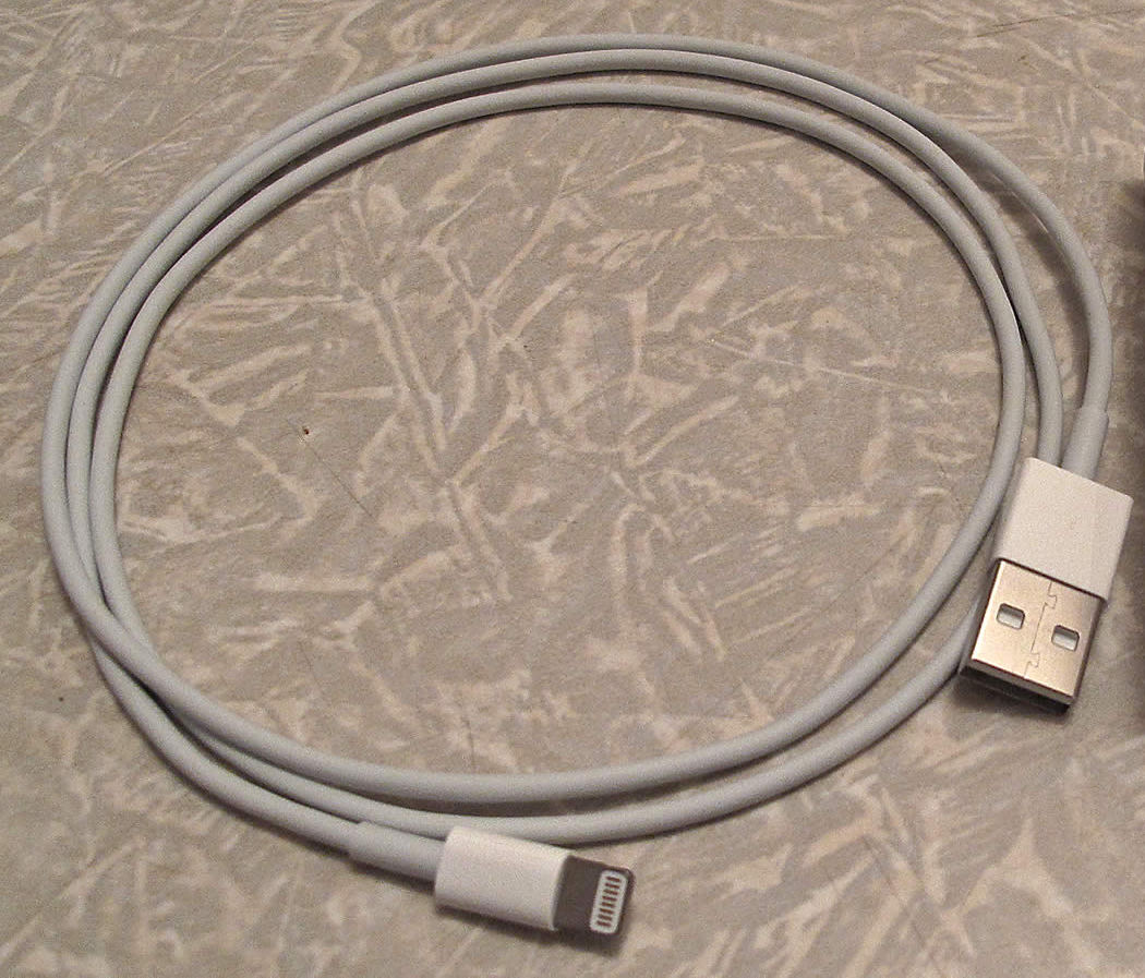 Кабель